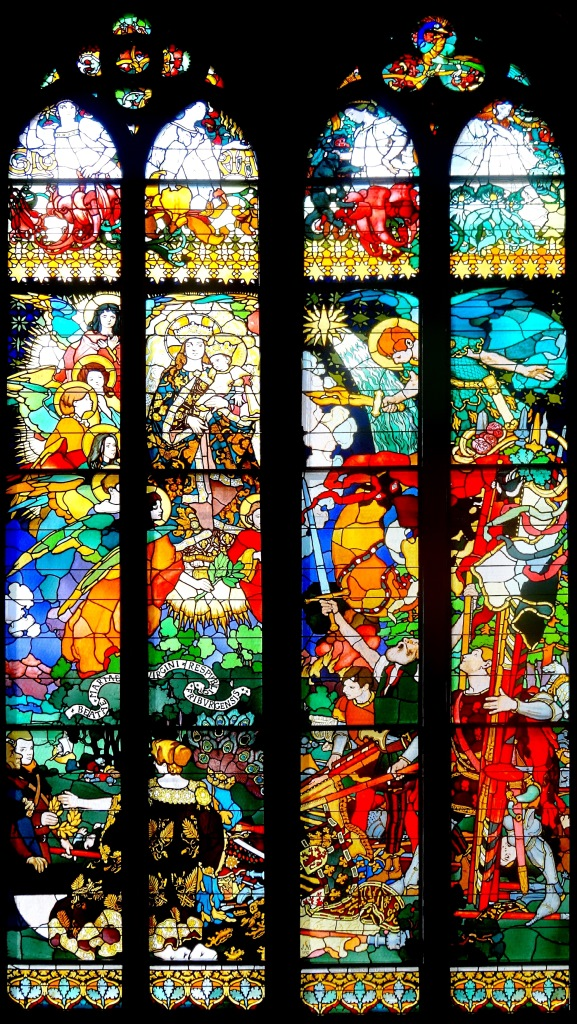 Cathédrale St-Nicolas de Fribourg (Suisse). Józef Mehoffer : Vitrail de Notre-Dame-de-la-Victoire.